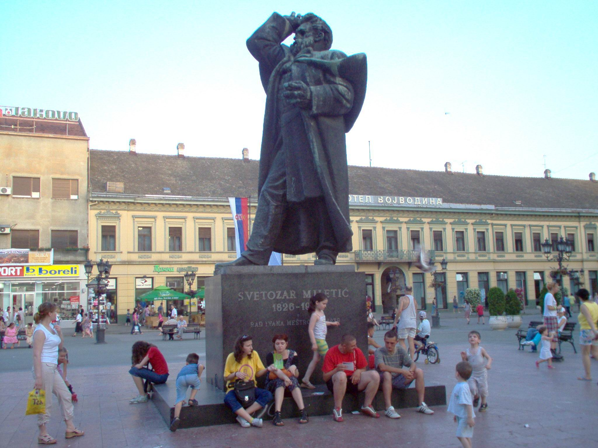 Светозар Милетић, споменик у Новом Саду Fotografisao Goldfinger. U javnoj upotrebi!